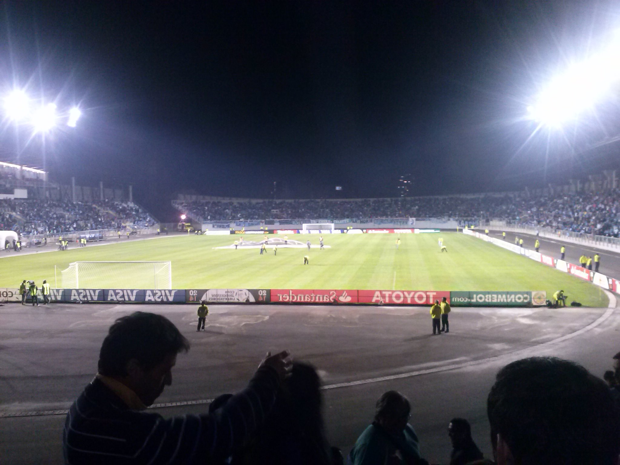 El Teniente